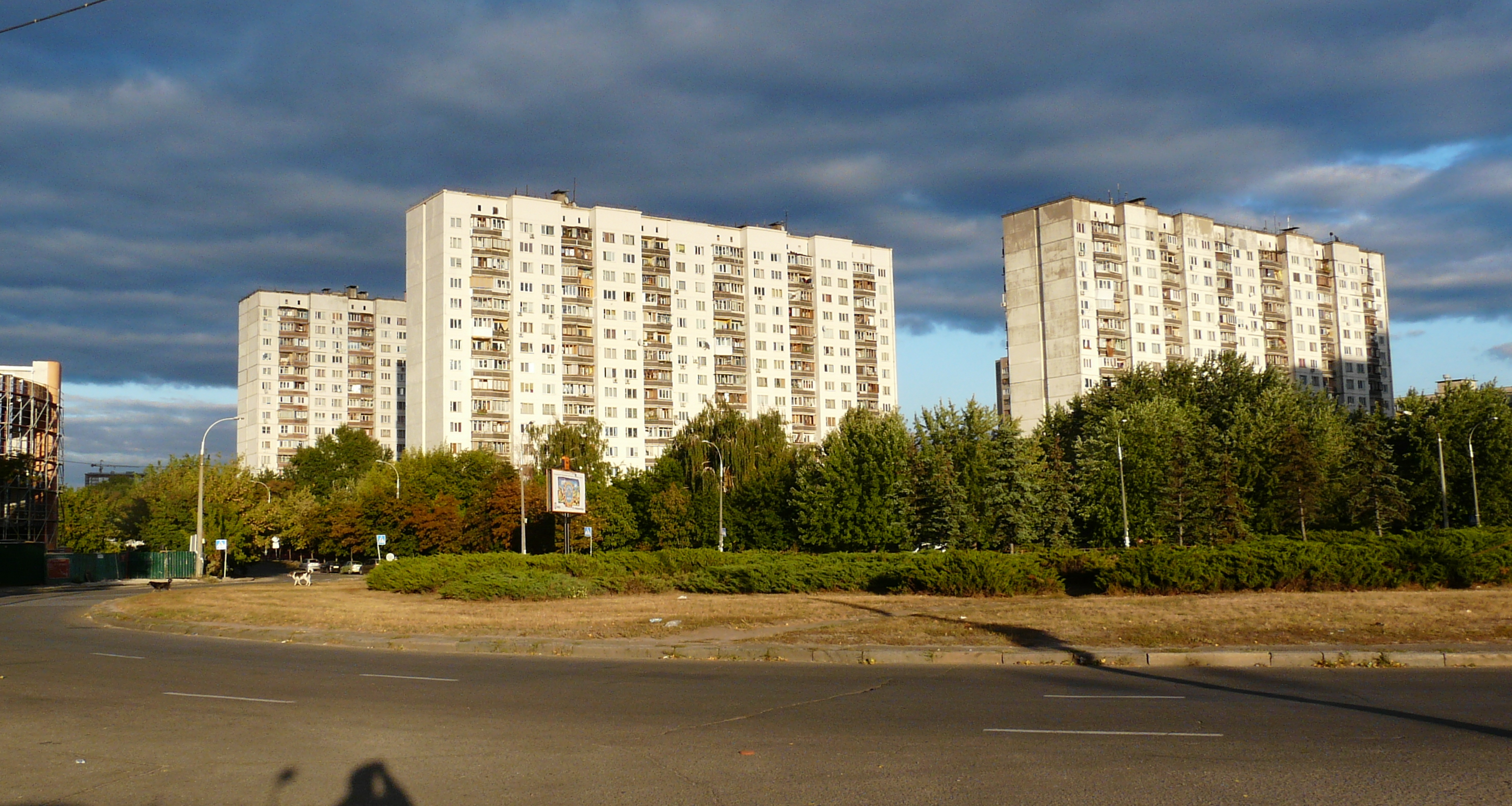 Площа Анатолія Луначарського (Київ) 4.JPG: Площа Анатолія Луначарського (Київ)